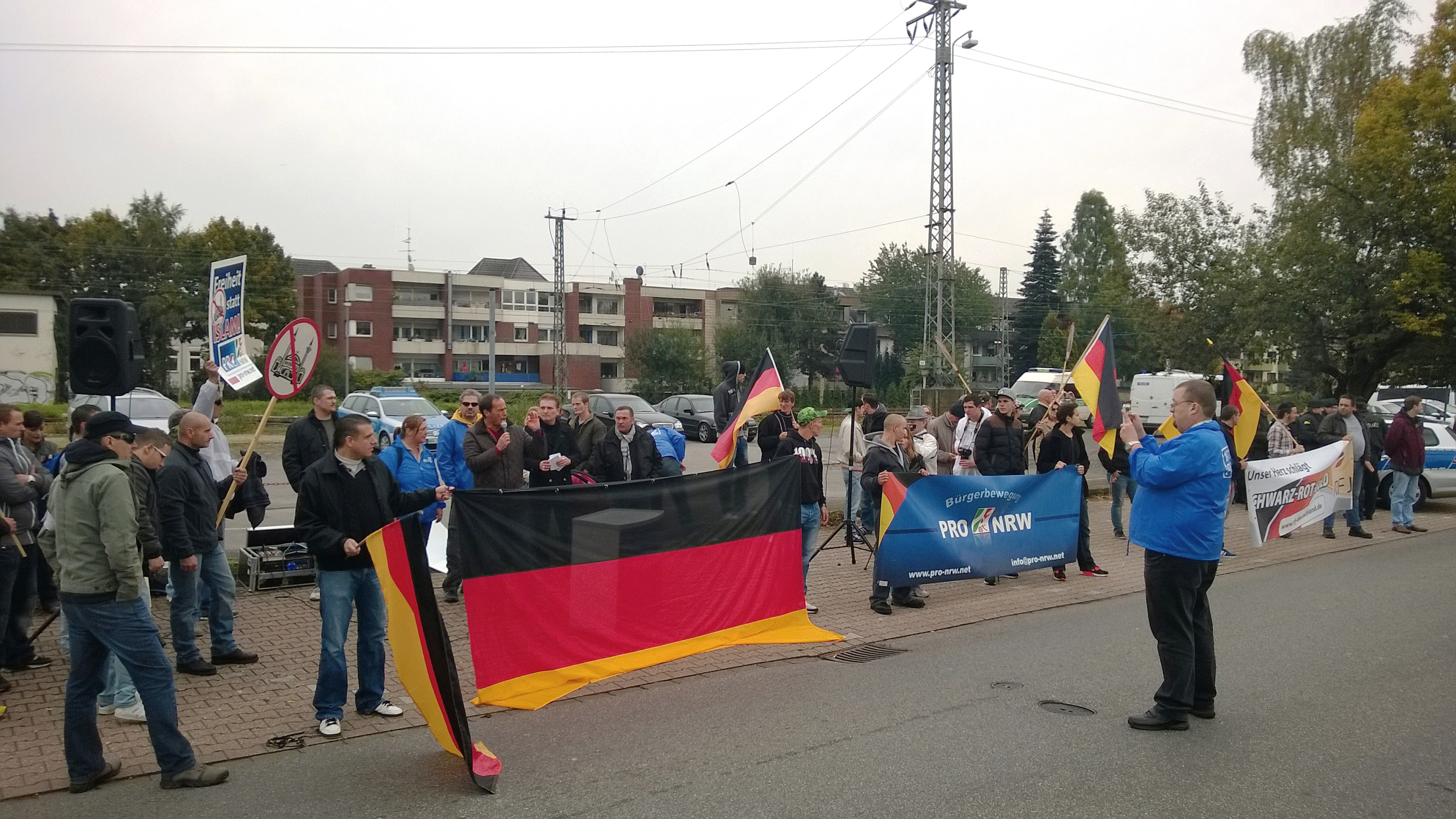 pro-NRW-Demo in Mönchengladbach Rheydt, Mittelstraße, schräg gegenüber der Ar-rahman-Moschee, am 12. 10. 2013, mit Jörg Uckermann, Stellvertretender Vorsitzender pro NRW und Vorstandsmitglied pro Köln (mit Mikrofon), Detlev Schwarz, Geschäftsführer pro NRW und Kreisvorsitzender pro Bonn (re. neben Uckermann) und Wolfgang Palm, Stellvertretender Vorsitzender pro NRW (re. neben Schwarz).